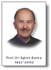 Aykut Barka